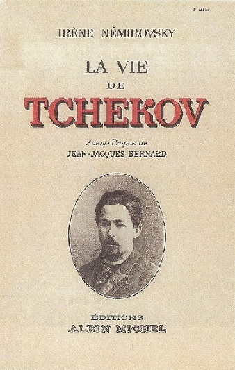 Couverture de la première édition (1946) de l'essai d'Irène Némirovsky sur Anton Tchekhov.